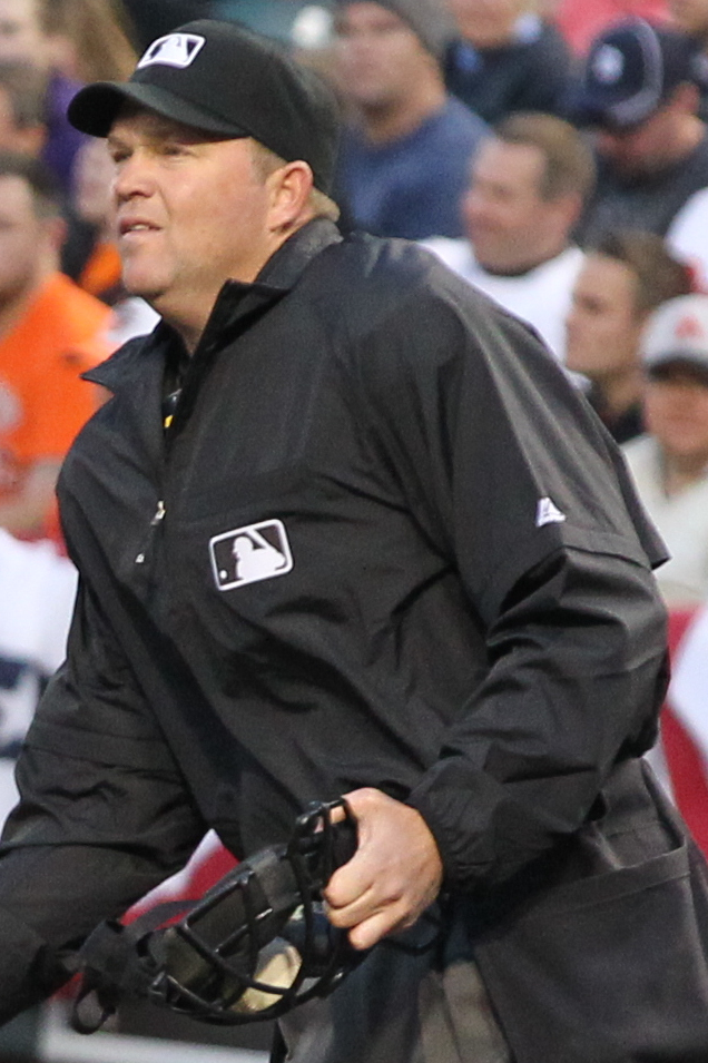 MLB umpire Ron Kulpa - Baltimore Orioles v/s Detroit Tigers April 7, 2011